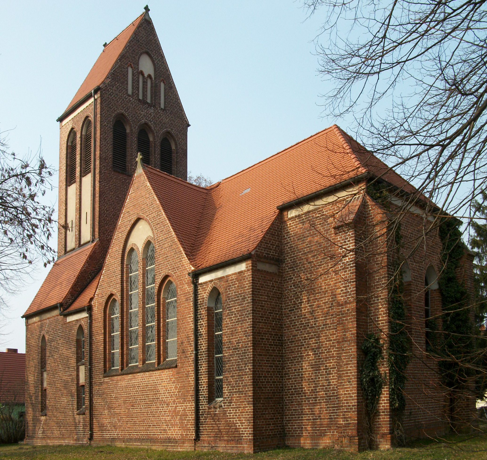 Denkmalgeschützte Dorfkirche in Grebs (Ortsteil von Kloster Lehnin), erbaut 1903/04